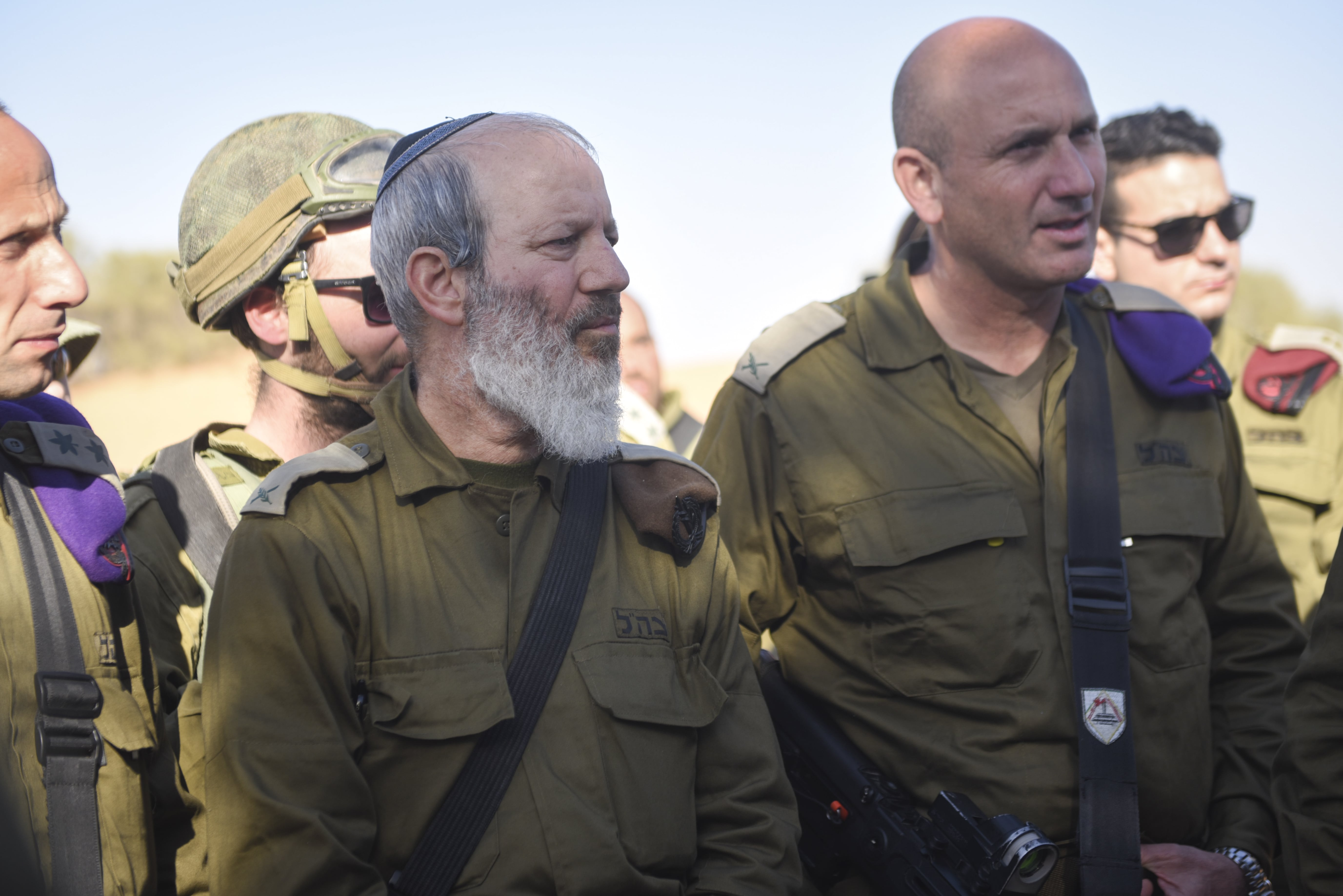 תא"ל הושע בן שלום